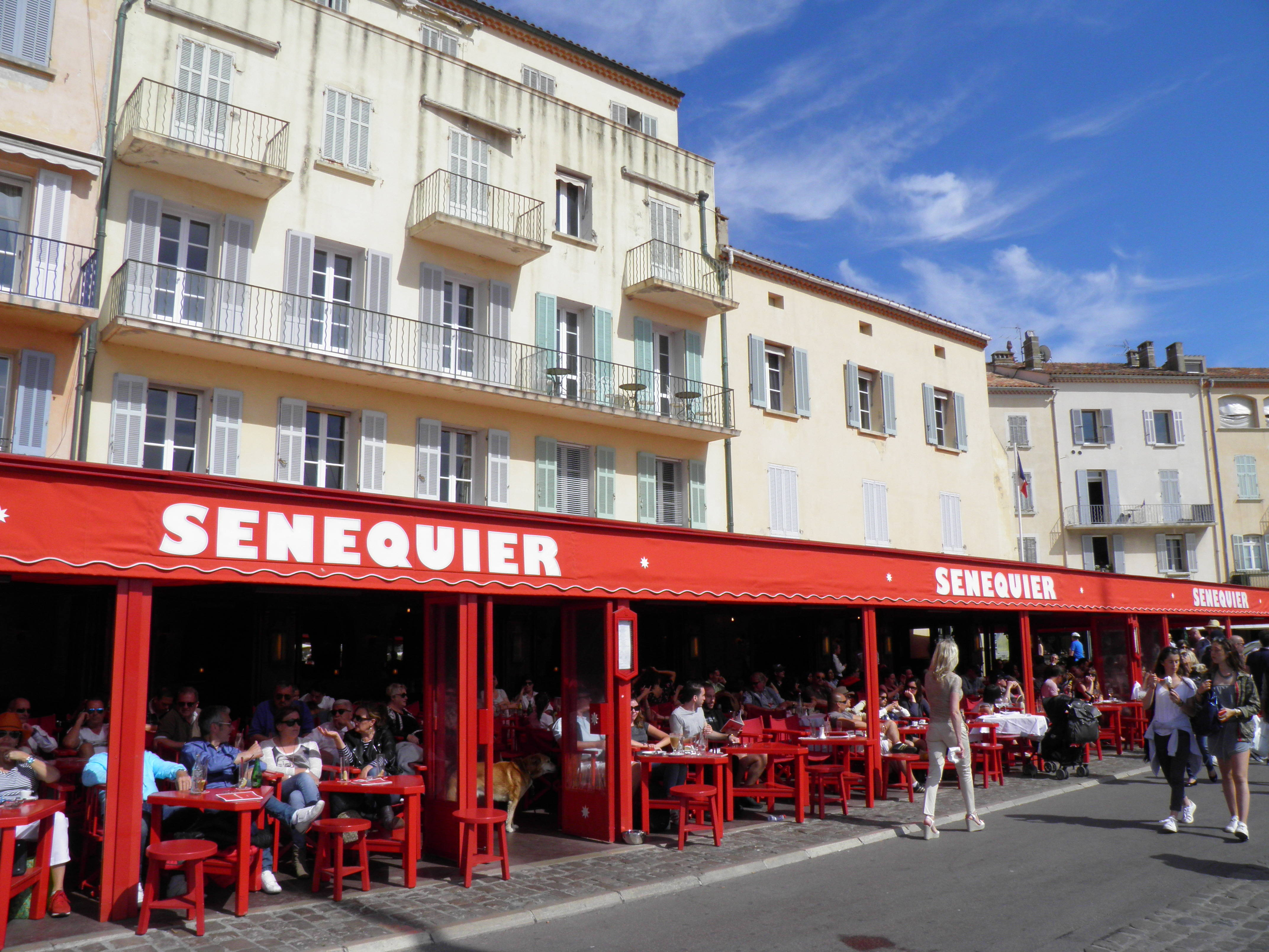 Port à Saint-Tropez (Var, France).